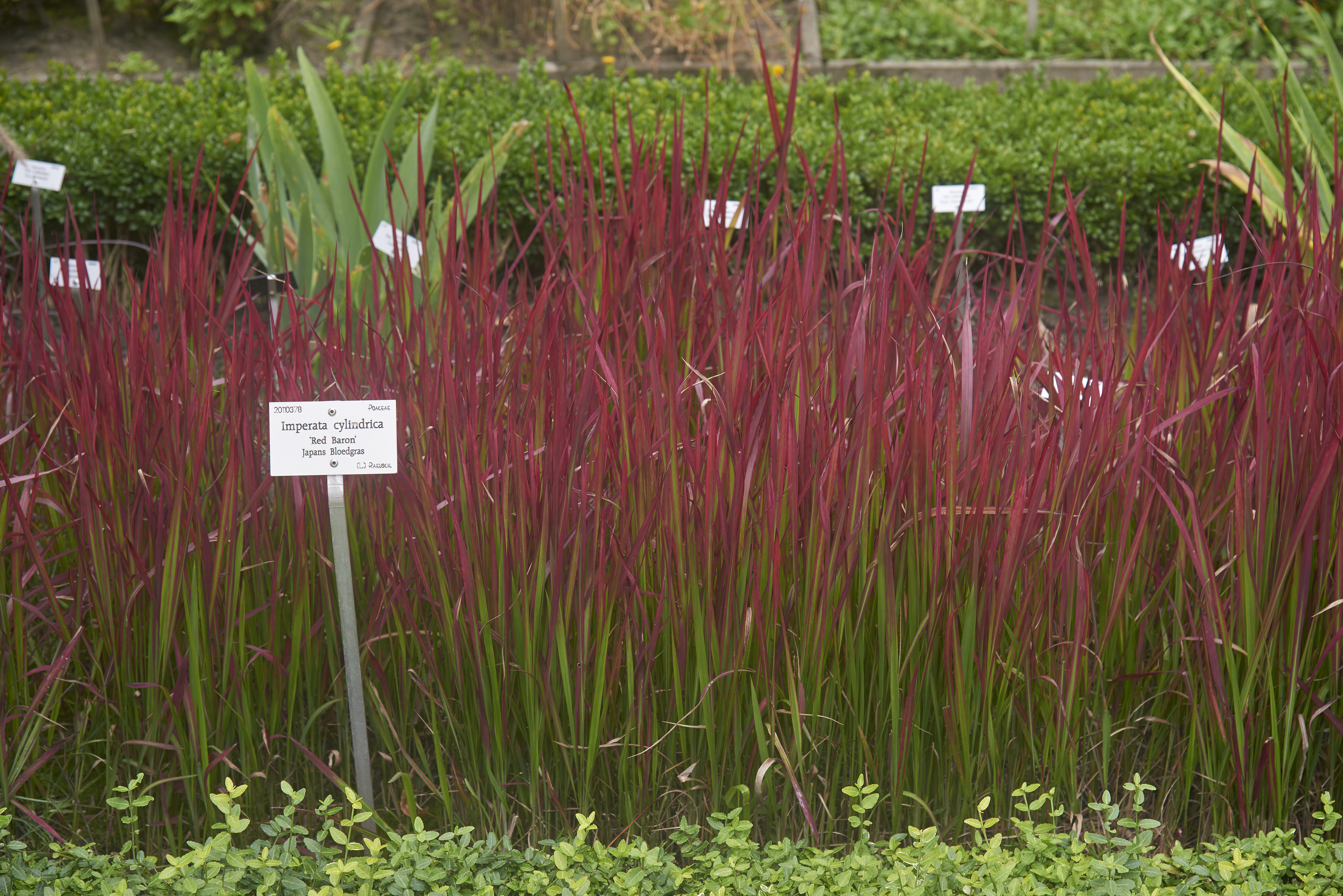 Imperata cylindrica 'Red Baron', Japans Bloedgras, Kruidtuin te Leuven, België